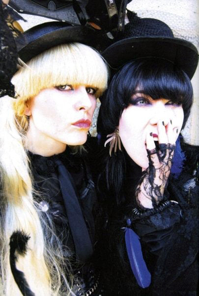 sue denim (left) dee plume (right)